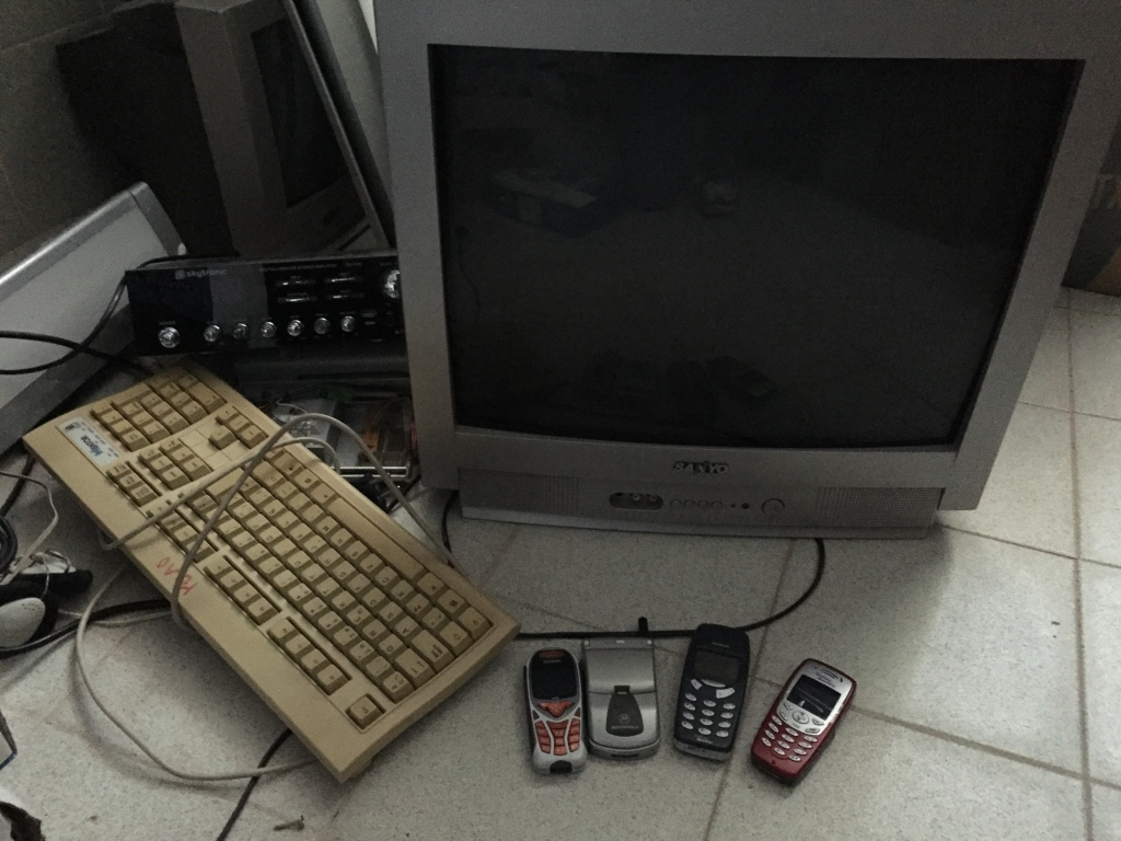 Material informàtic apartat per obsolet que encara funciona